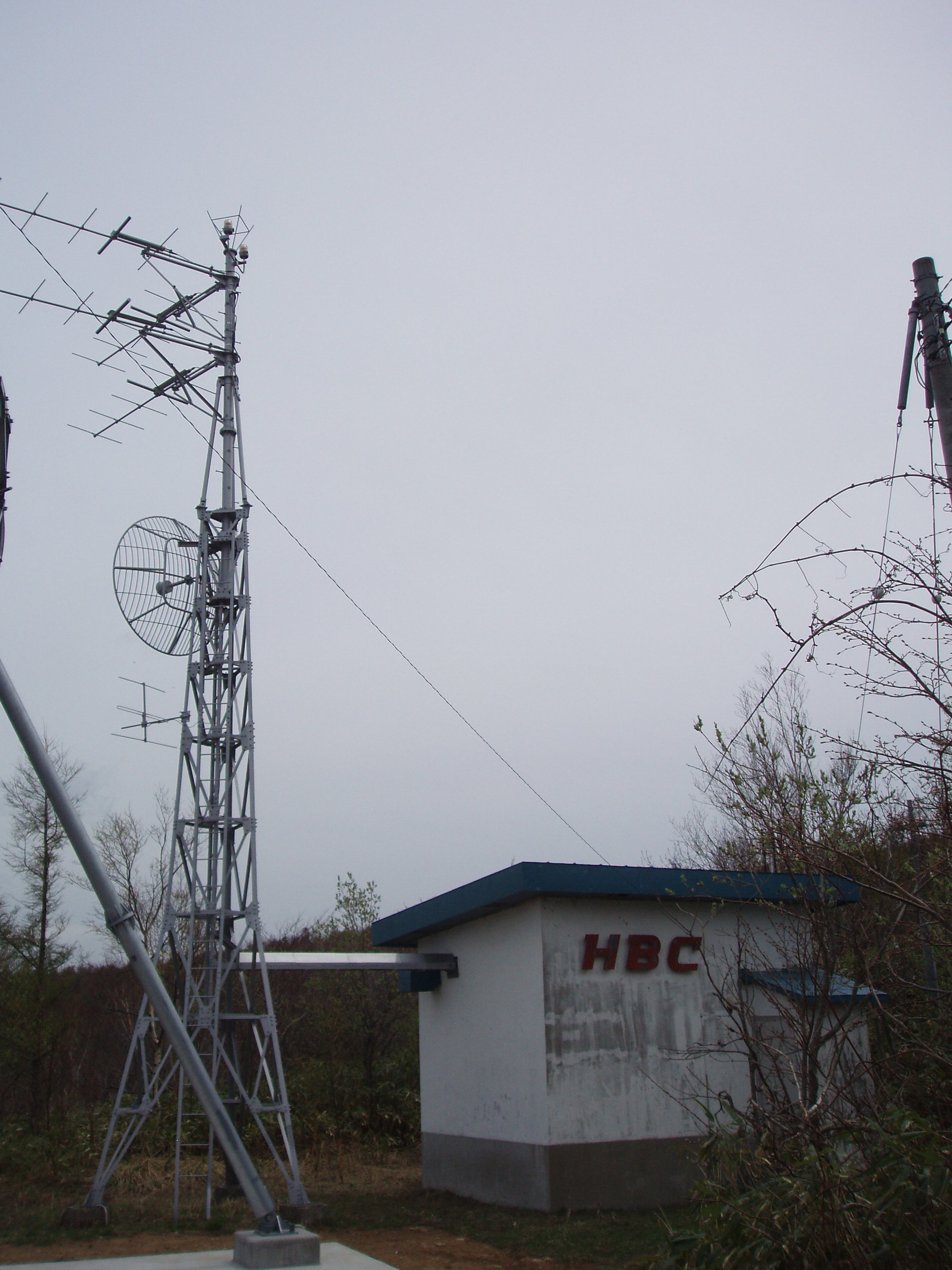 岩内中継局 HBC送信設備（アナログ）